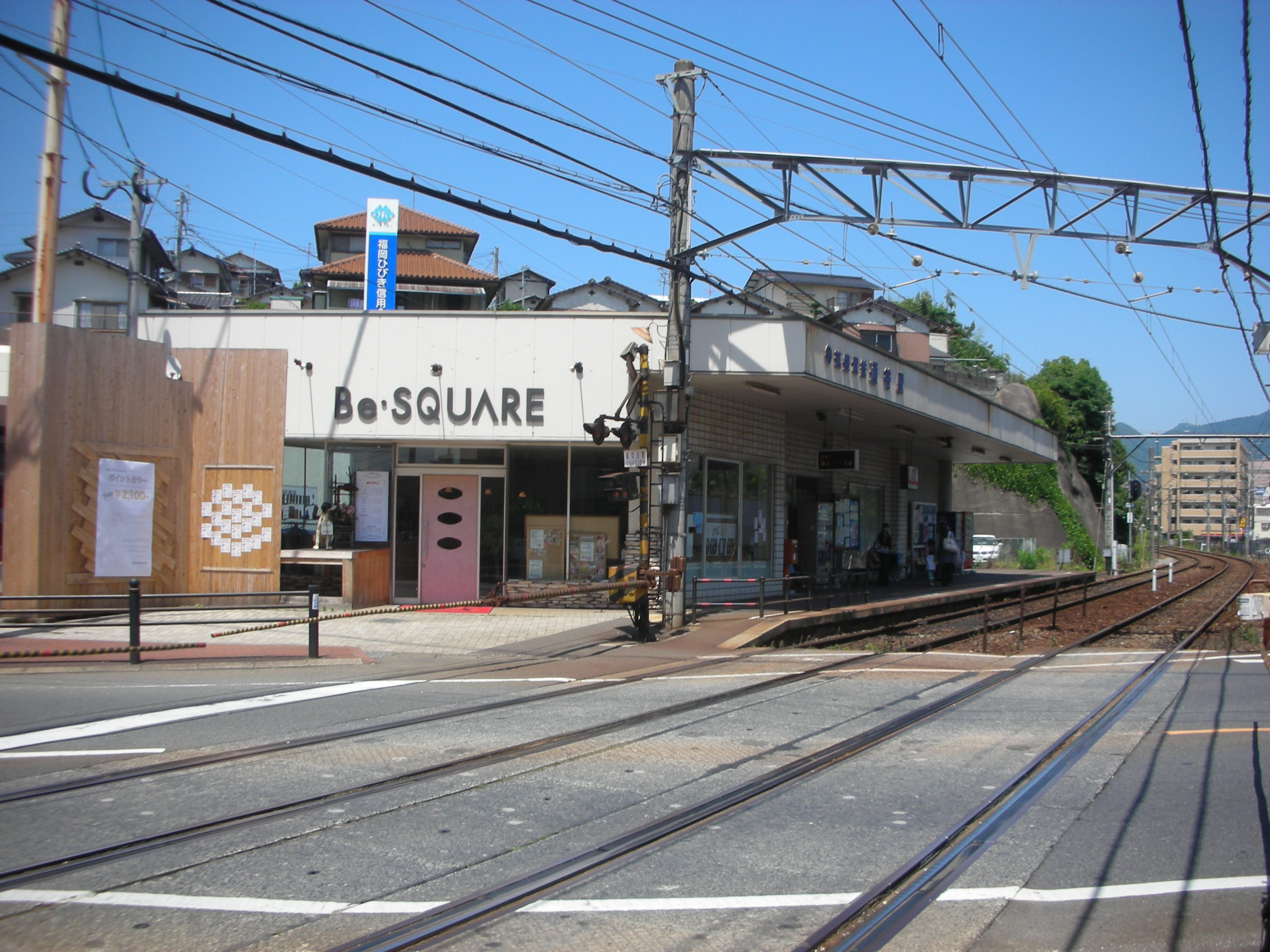 2009/6/16におんさき自身が撮影。福岡県中間市、筑豊電鉄・通谷駅。